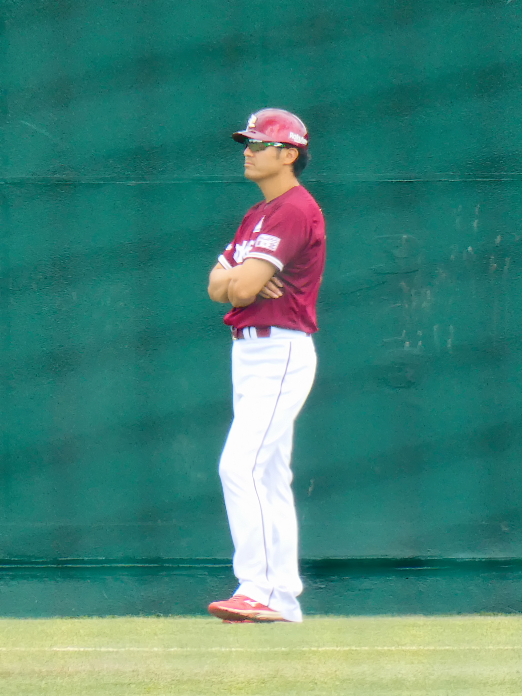 東北楽天ゴールデンイーグルスのコーチ「牧田明久」。ヤクルト戸田球場にて。